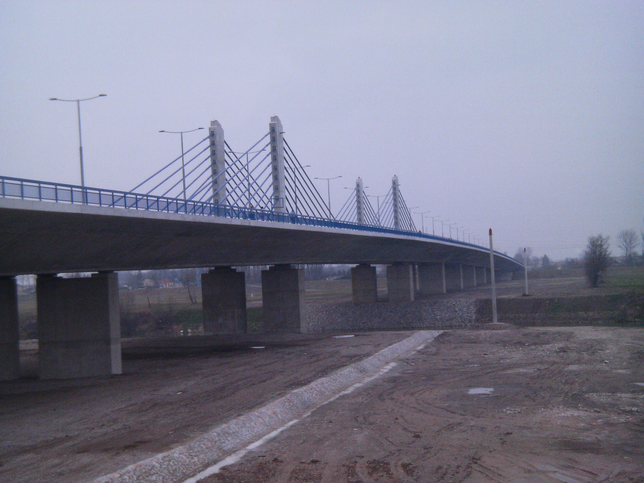 Domovinski most u Zagrebu